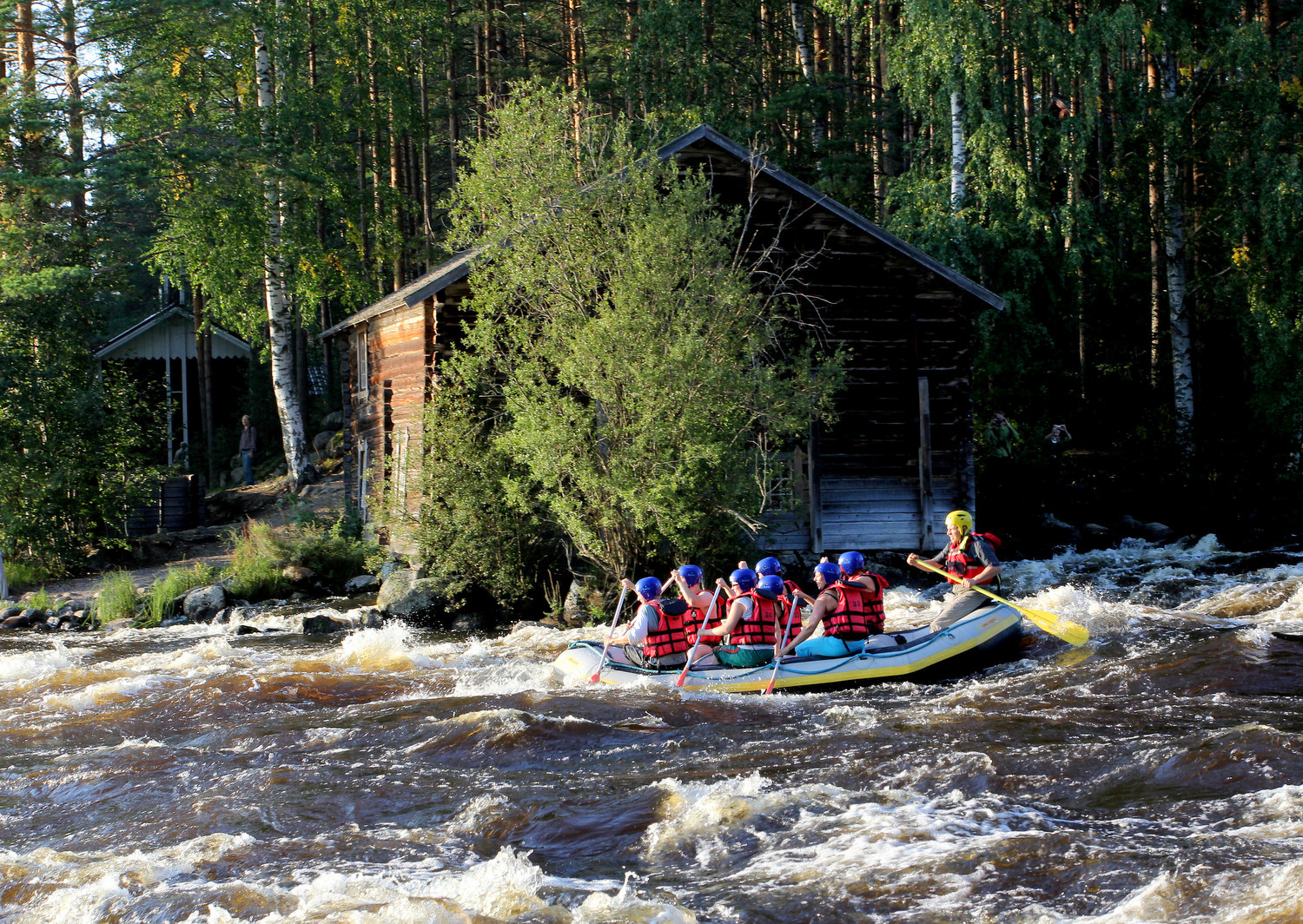 Koskenlaskua kumilautalla Äänekosken Kapeenkoskella